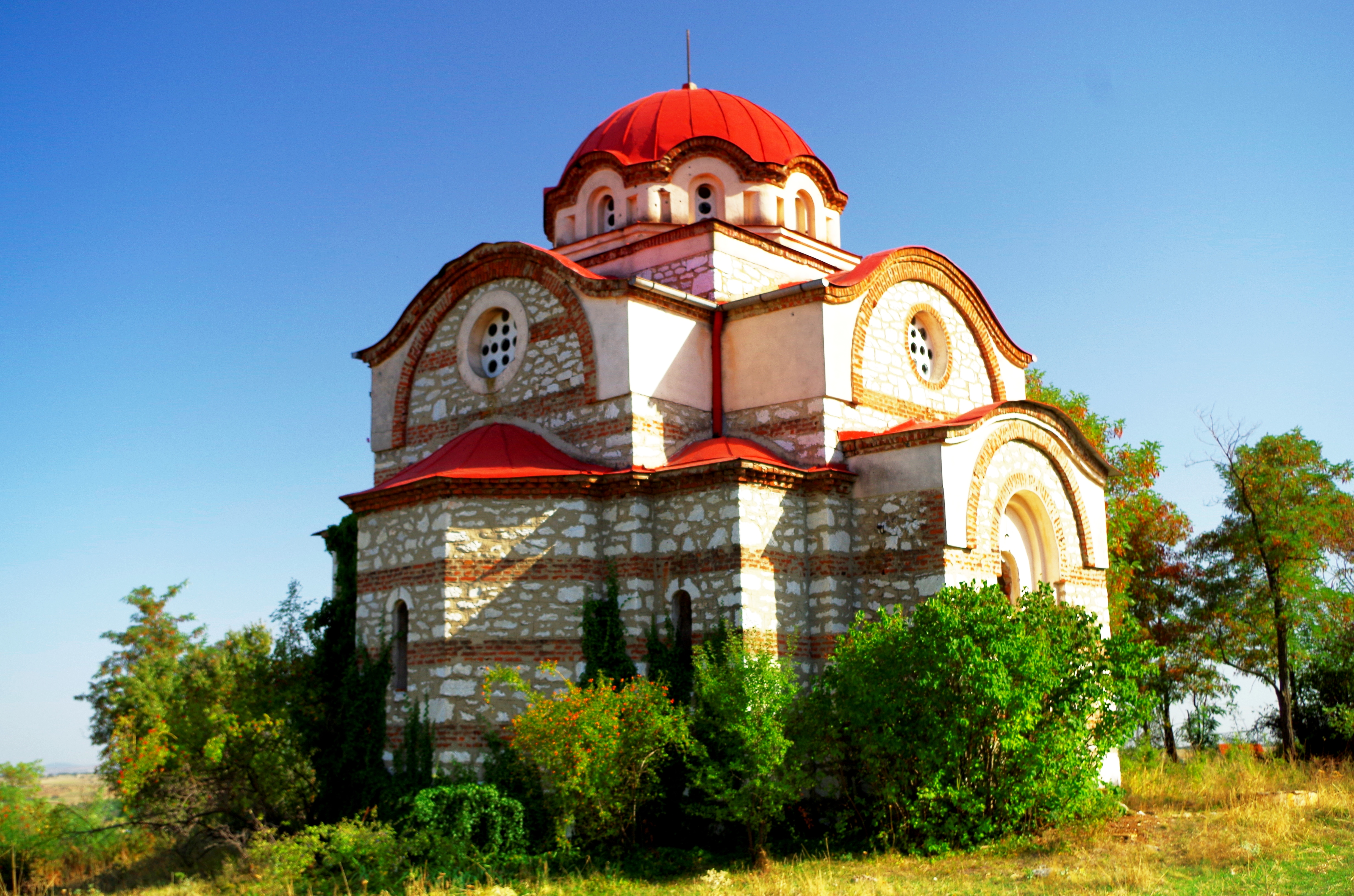 Преубавиот храм св. Спас во селото Матејче, лоциран на прекрасна највисока локација во селото.